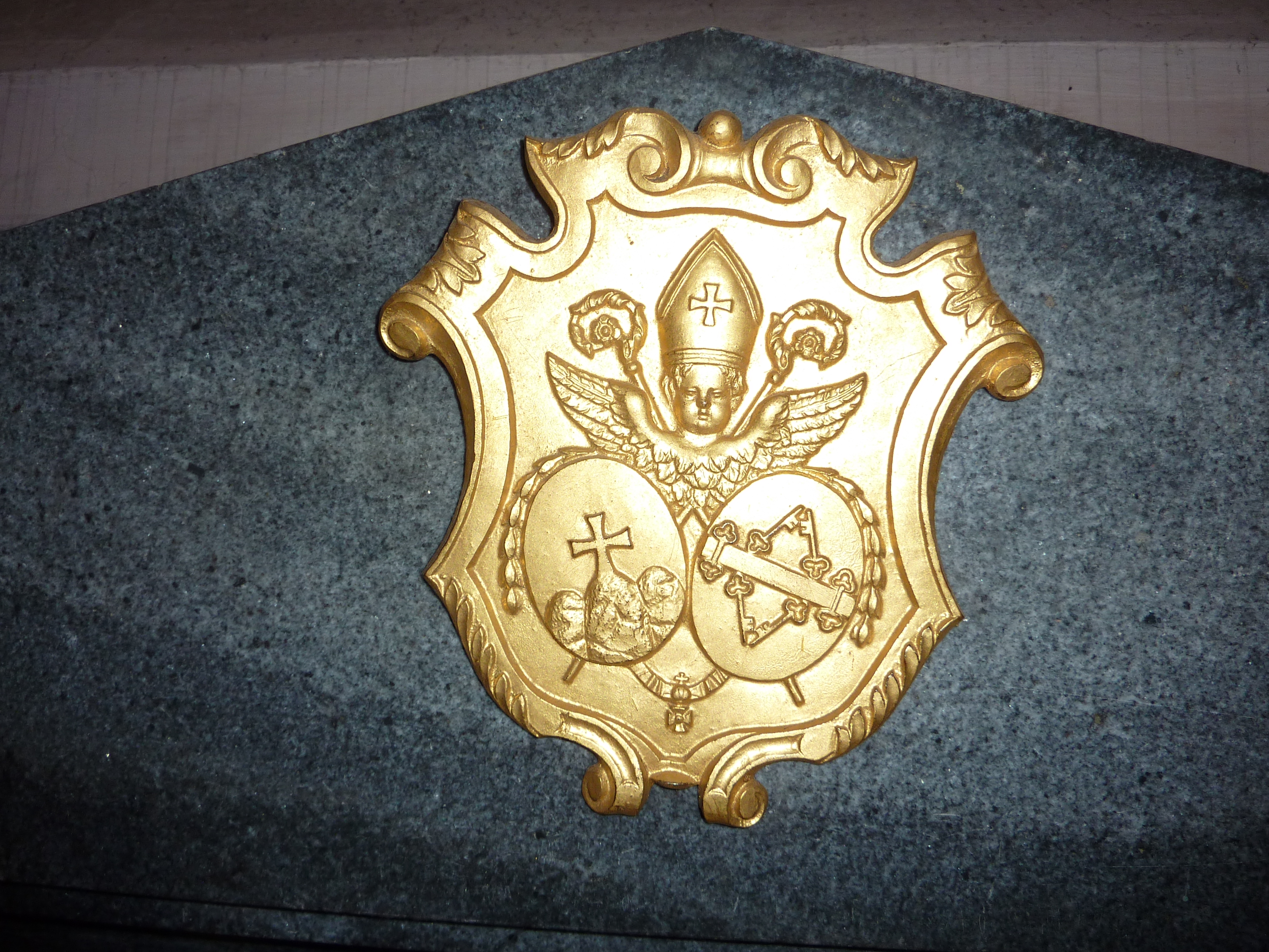 Stiftskirche Göttweig, Niederösterreich - Wappen von Abt Altmann Arigler (1812-1846) am Epitaph in der 2. südlichen Seitenkapelle